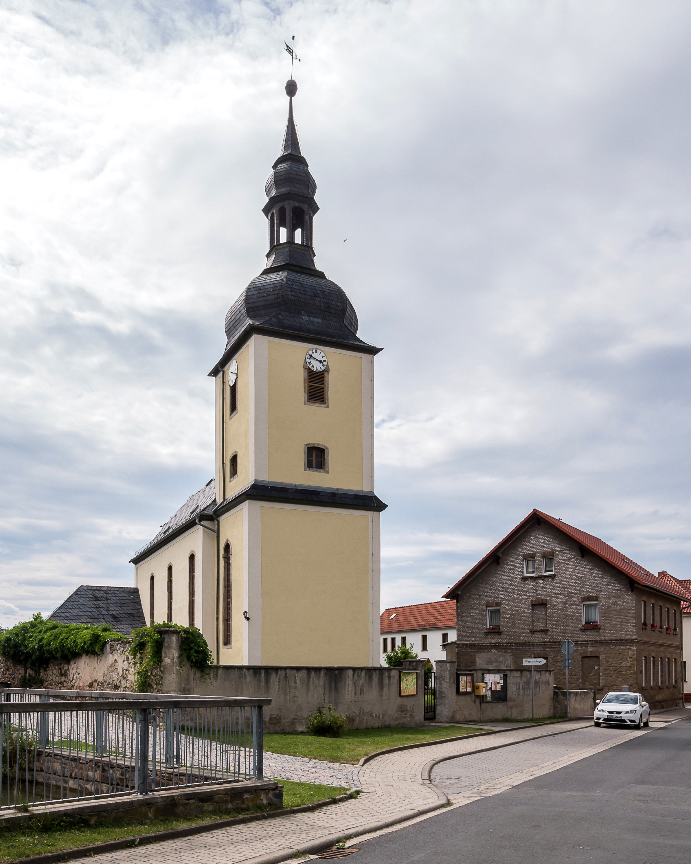 Nimritz Dorfkirche